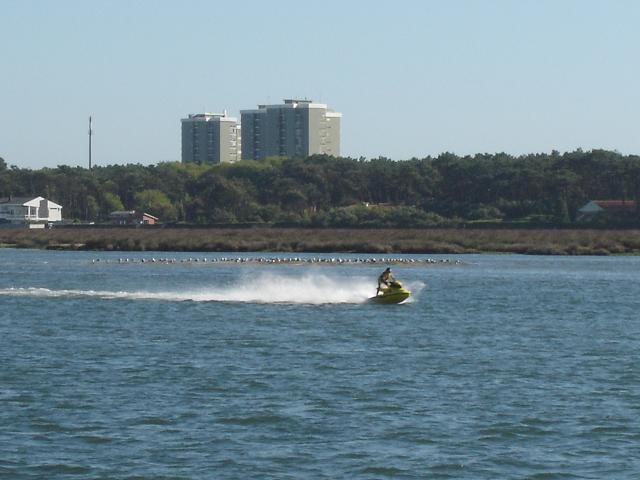 Praia de Ofir, Portugal.